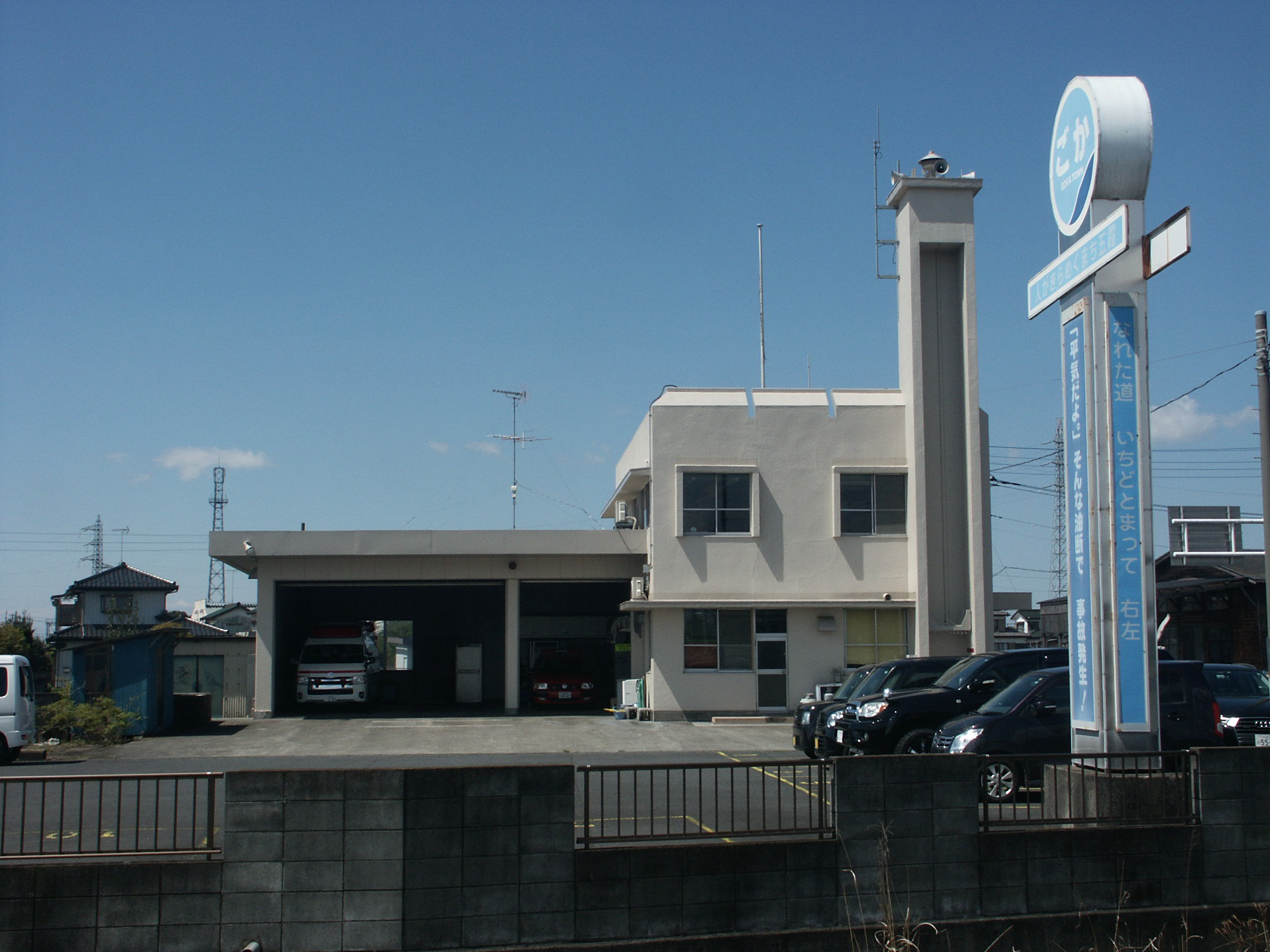 茨城西南地方広域市町村圏事務組合消防本部古河消防署五霞分署庁舎